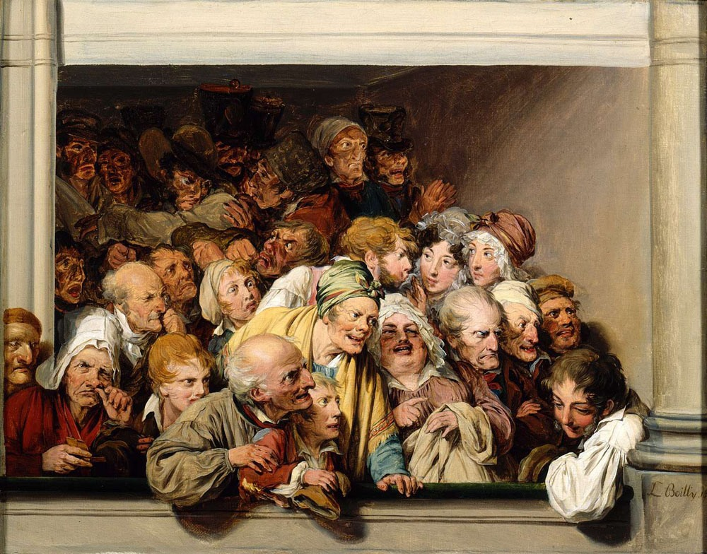 bức tranh của Louis Leopold Boilly